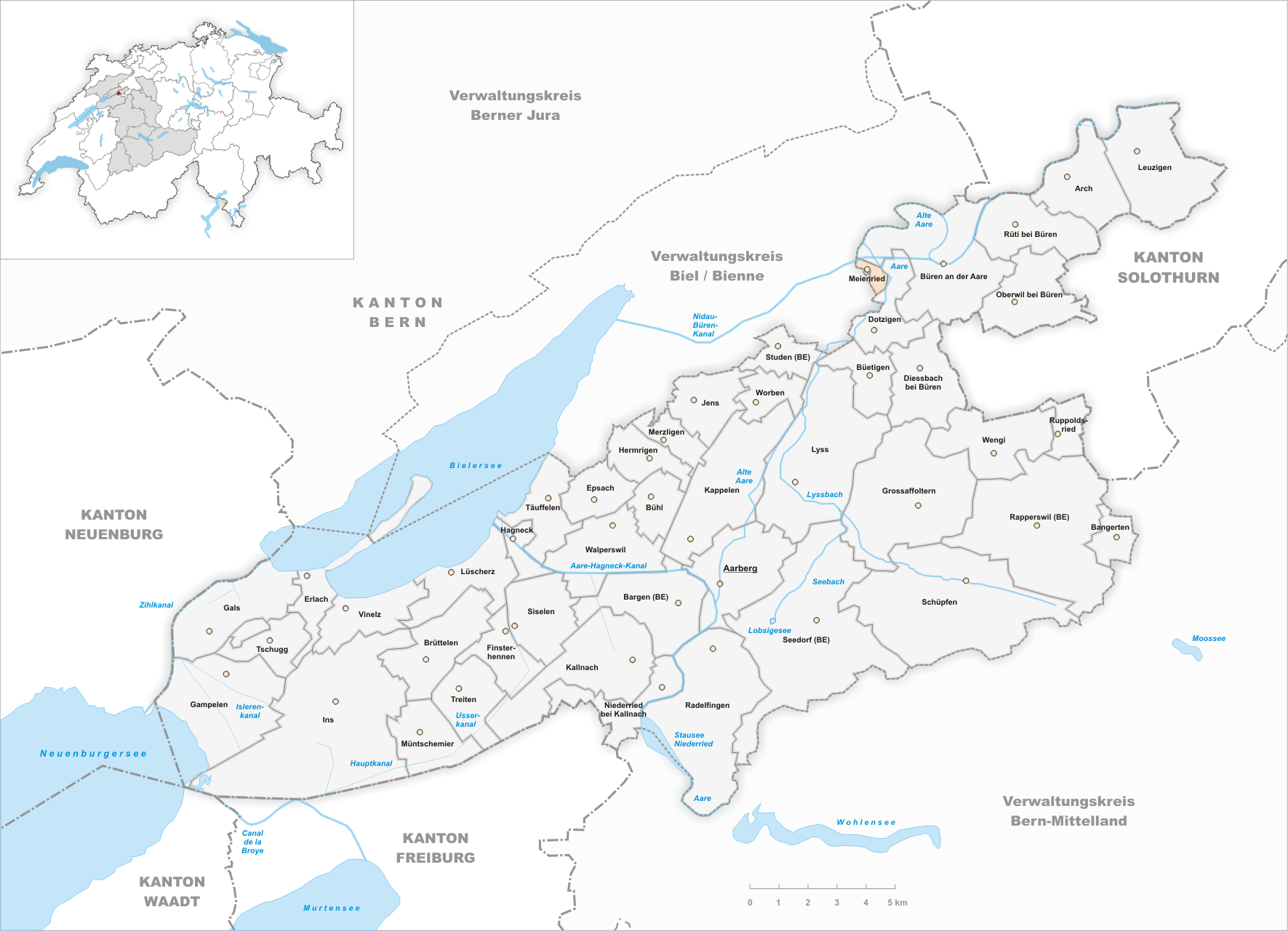 Municipality Meienried